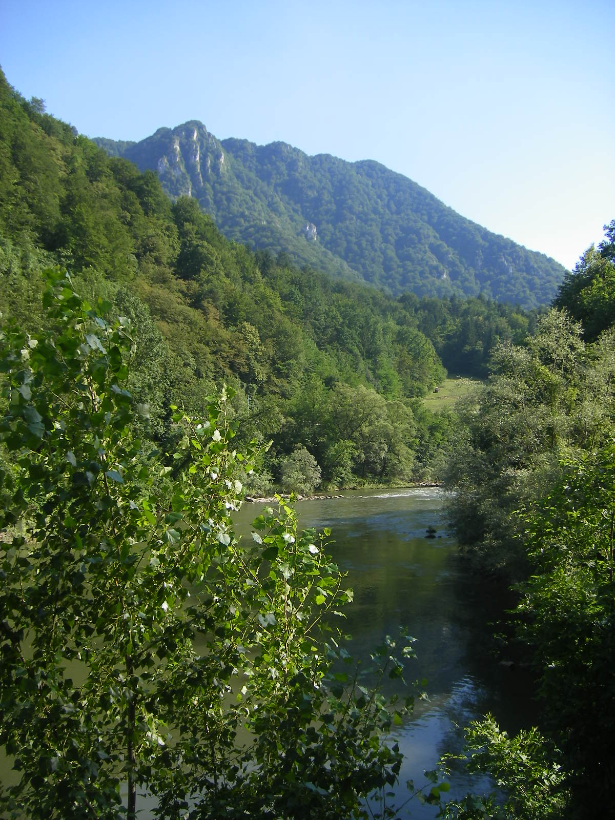 Between Laško and Zidani Most (Savinja Valley)